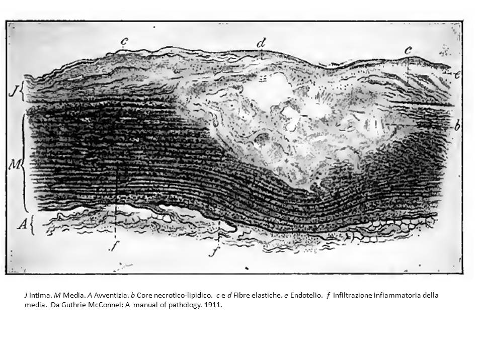 File adattato dalla figura 120 da: Guthrie McConnel. A manual of pathology. 1911